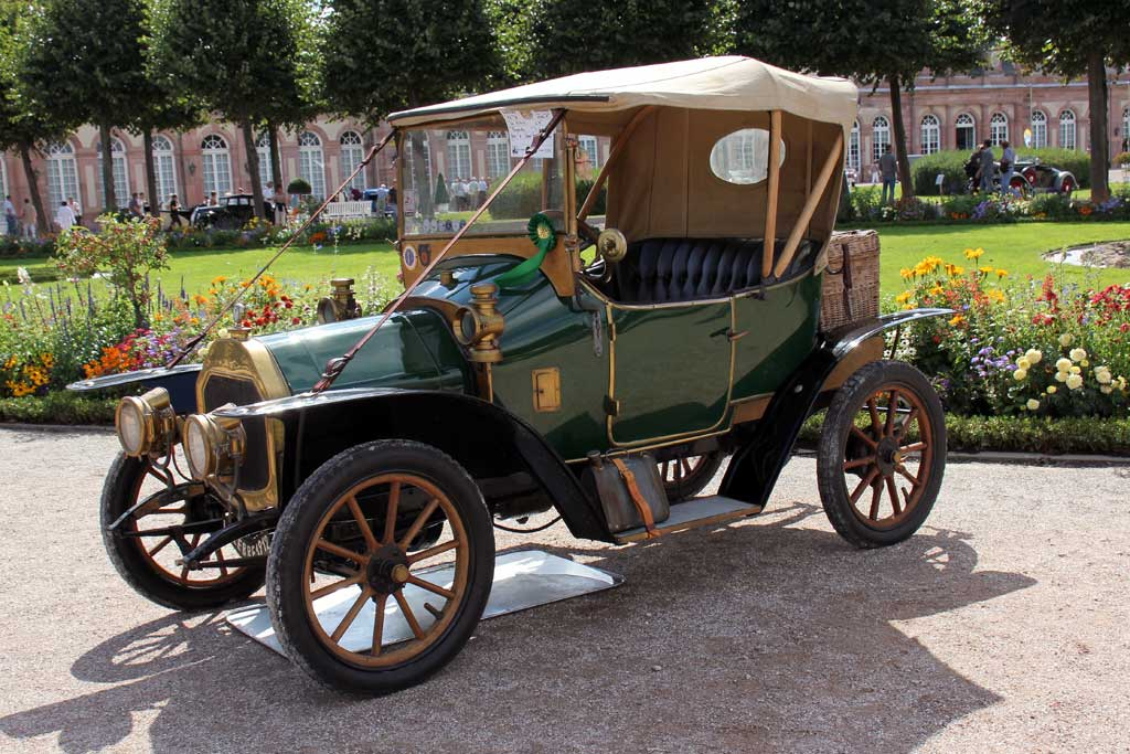 1912 Le Zebré C4 Torpedo_IMG_1114